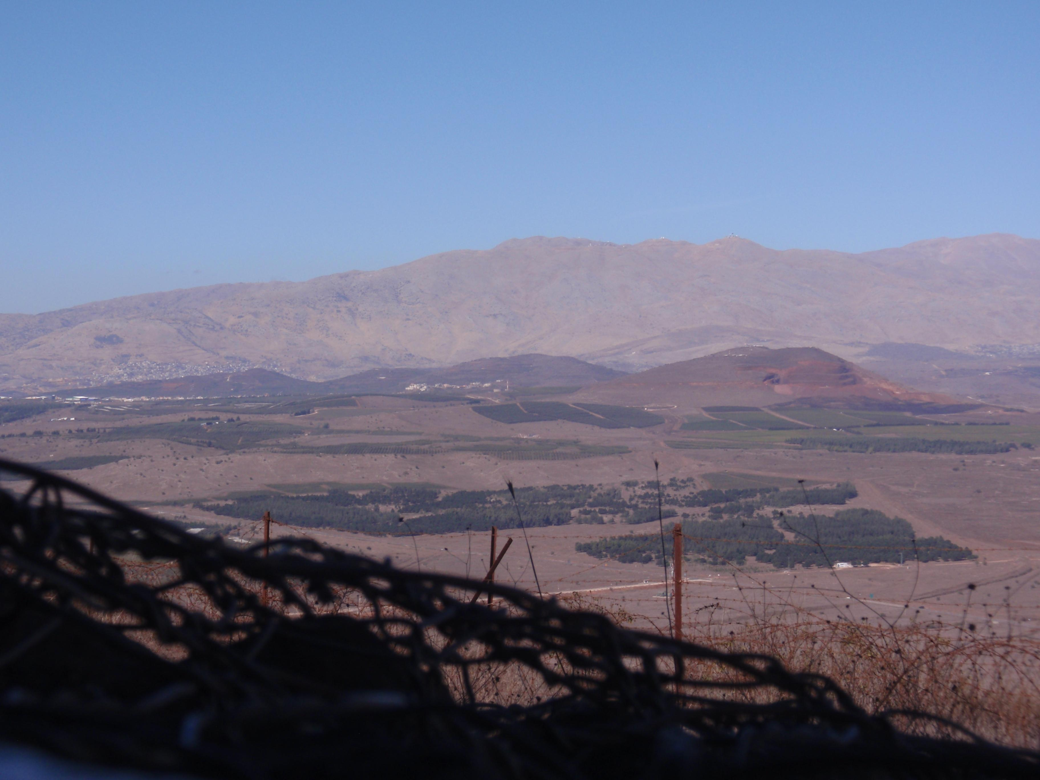 Five mountains in northern Golan Heights (from the front to rear): Mount Hermonit, Mount Varda, Mount Kramim, Mount Ram and Mount Hermon.